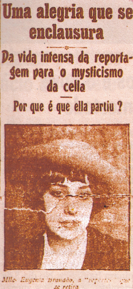 Chamada do jornal A Rua para a notícia sobre a internação de Eugênia Brandão em um asilo de moças.